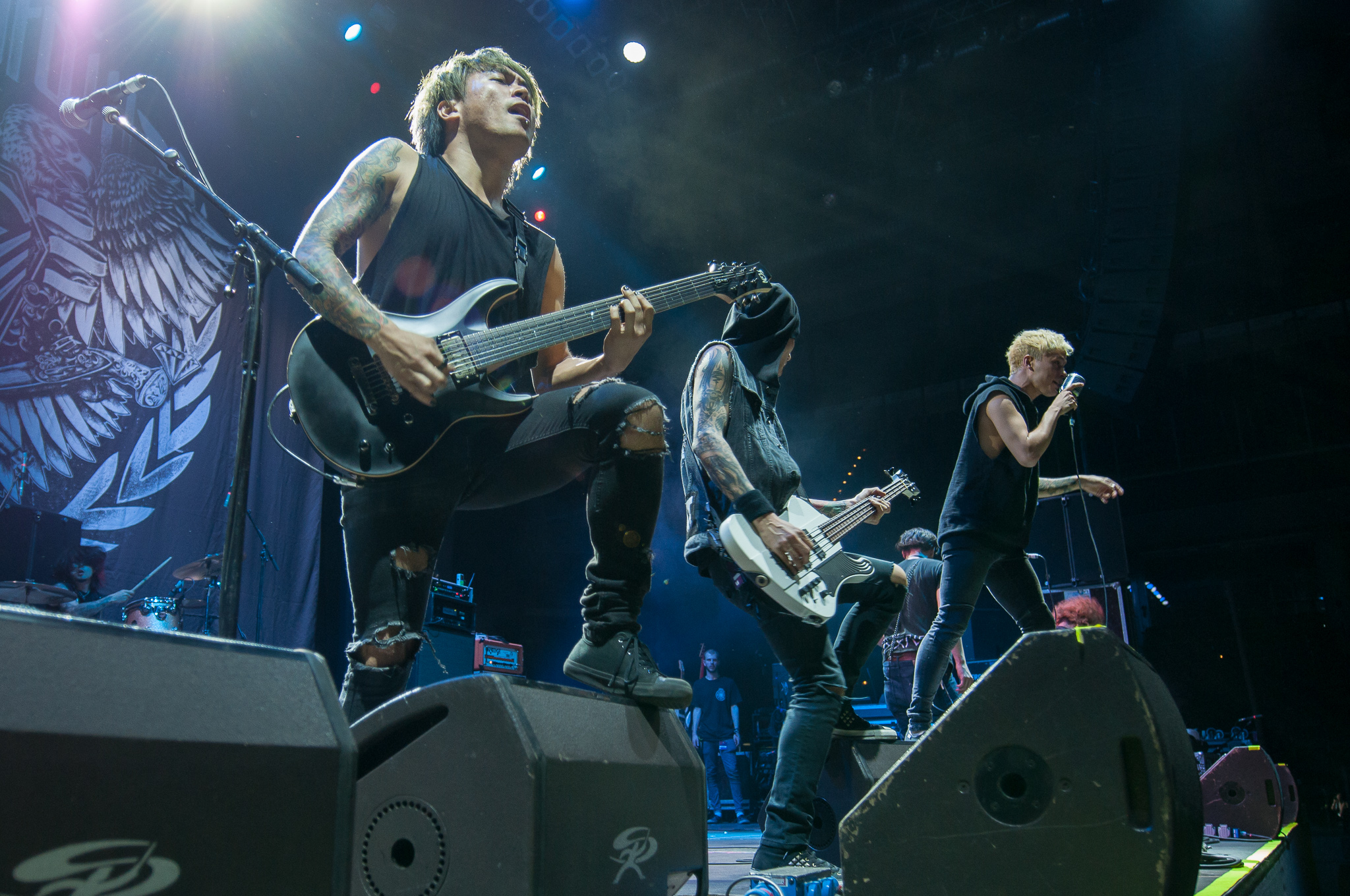 ARGO-Konzerte,Arena Nürnberger Versicherungen,Clubstage,Coldrain,Konzert,Livekonzert,Livemusik,Musik,RiP,Rock im Park 2014